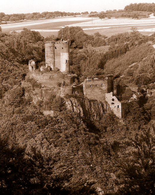 Westliche Ansicht der Ehrenburg von der gegenüberliegenden Ehrbachtalseite. Um 1950.